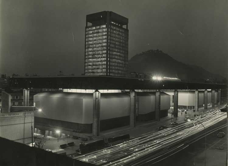 Vista aerea o en altura del edificio UNCTAD luego de su inauguración (Centro Cultural Gabriela Mistral). Fotografía tomada desde la vereda contraria en la Alameda, probablemente desde el edificio de la Casa Central de la Universidad Católica. El edificio se ve iluminado en su interior y en la entrada. Al menos seis personas se observan en la vereda frente a la entrada del edificio. En la calle se ven vehículos en movimiento y líneas o haz de luces señalando su trayectoria (efecto fotográfico). En la calle junto al edificio hay varios vehículos estacionados, incluyendo dos buses o camiones oscuros y cerrados. Aparece también parcialmente un vehículo policial en el borde inferior izquierdo de la imágen. Al fondo, detrás del edificio se ve el cerro San Cristóbal.